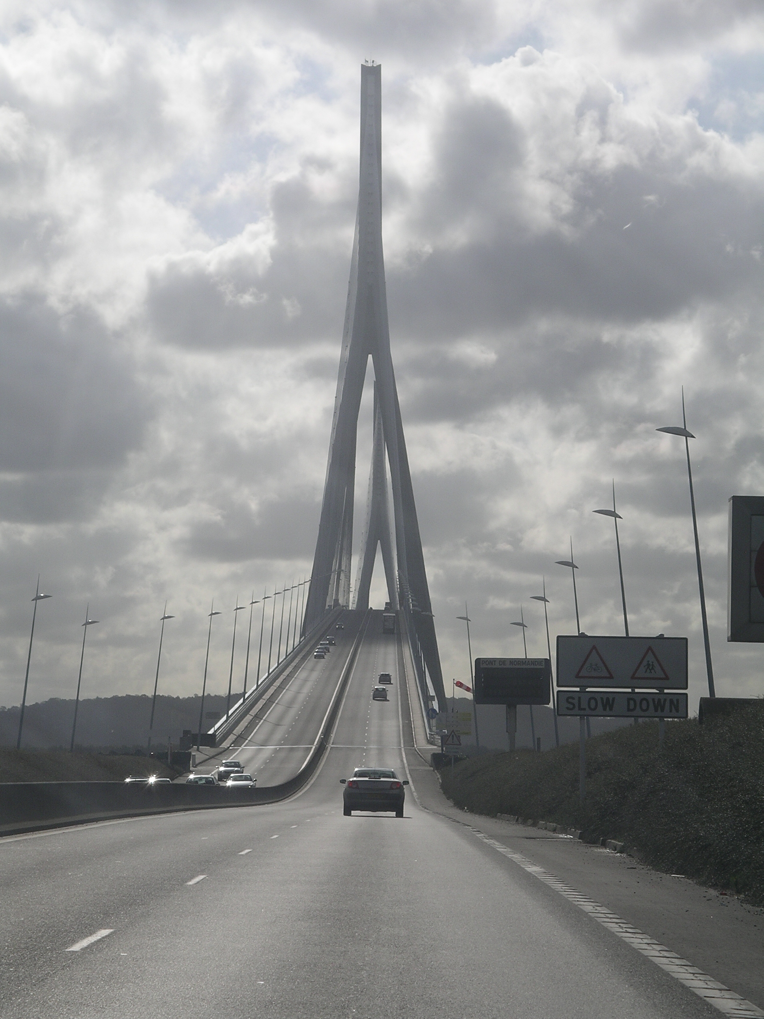 Le Pont de Normandie, en direction de Honfleur.